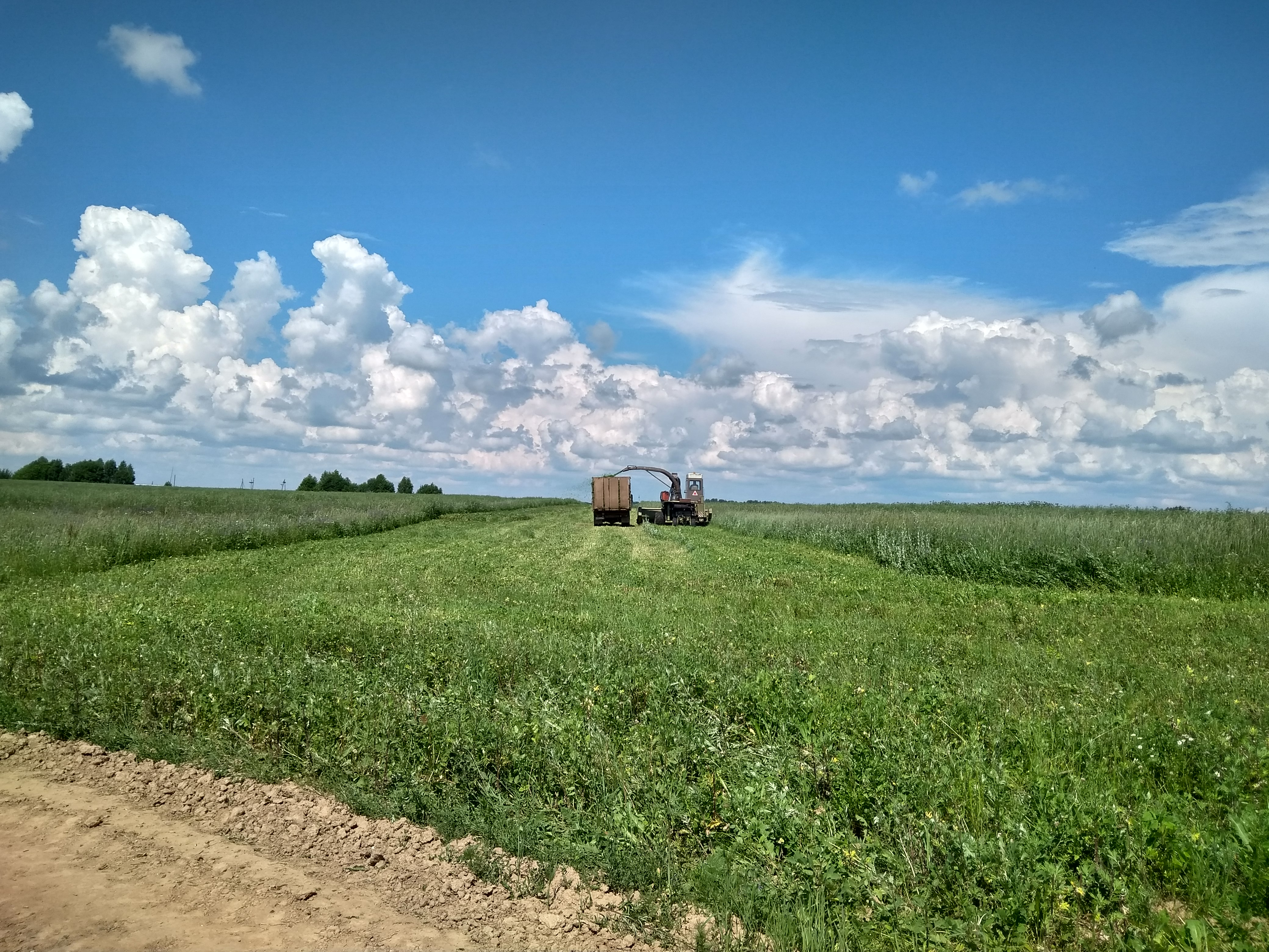 Заготовка кормовых в СПК колхозе им.Свердлова